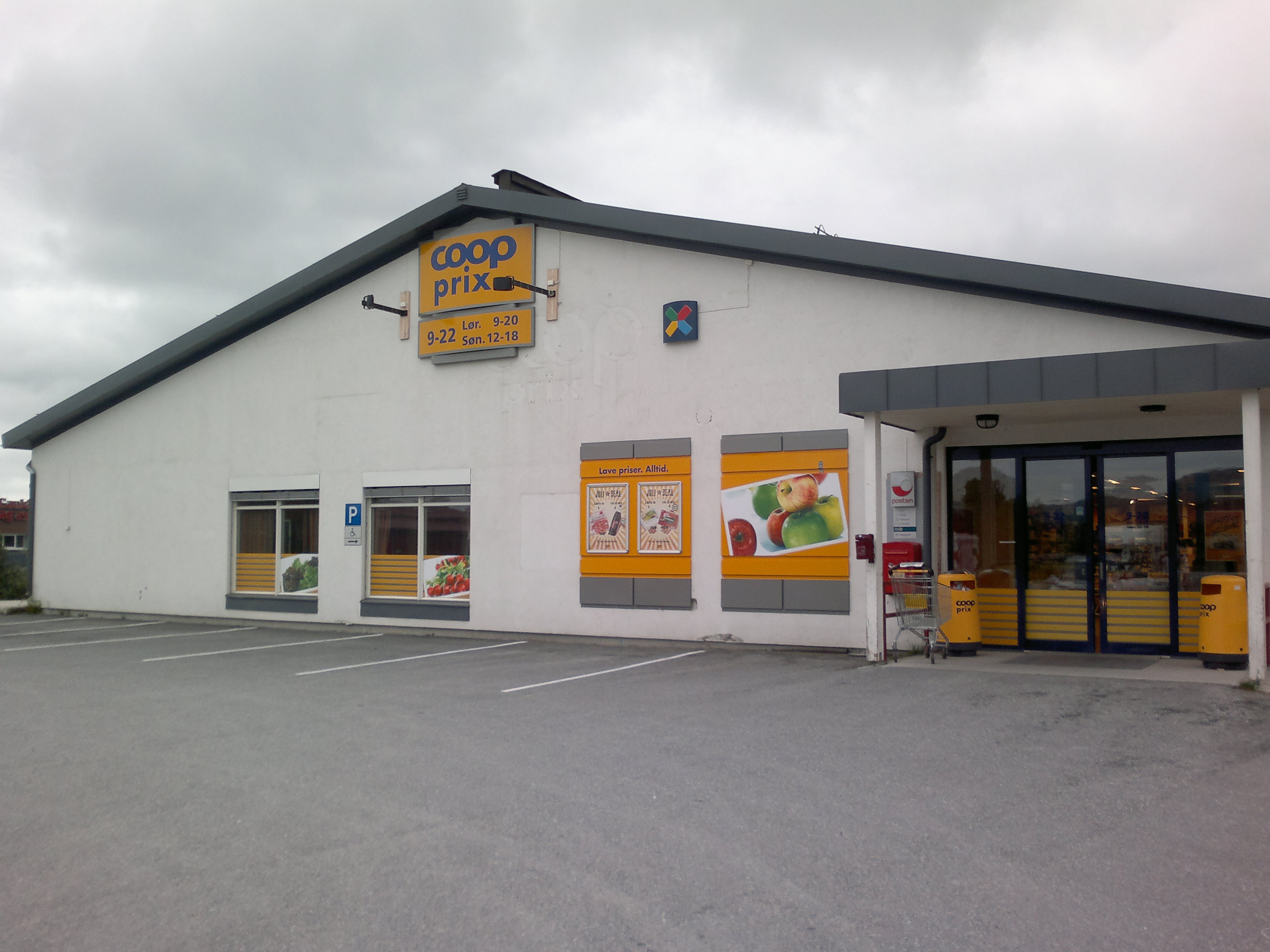 Coop Prix Rørosissa, Norjassa, Etelä-Trøndelagin läänissä.